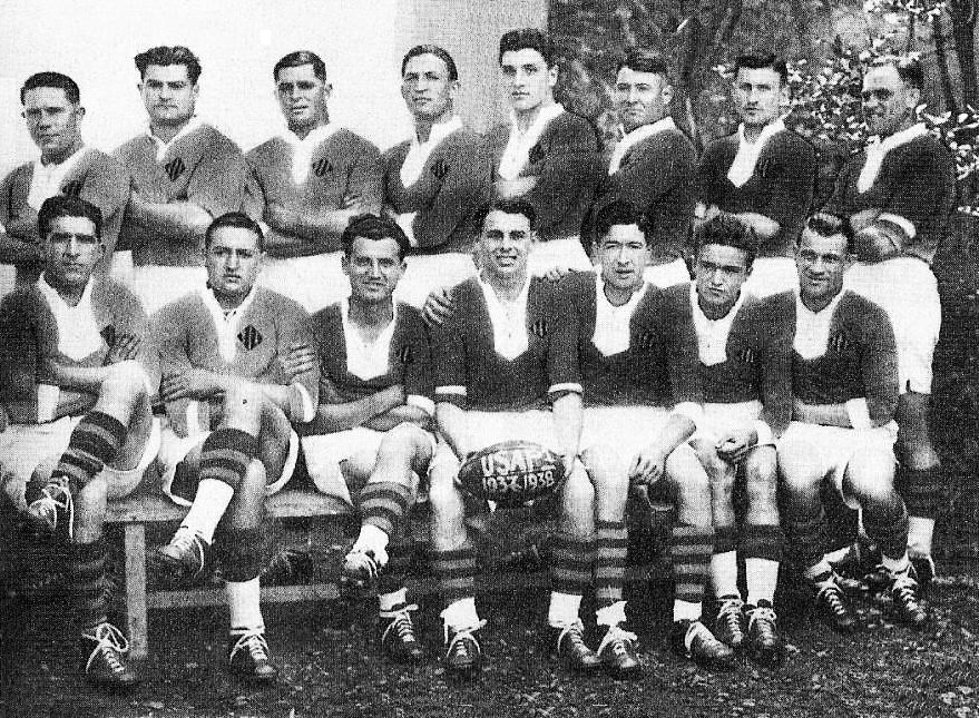 Photo de l'USA Perpignan lors de la saison 1937-1938